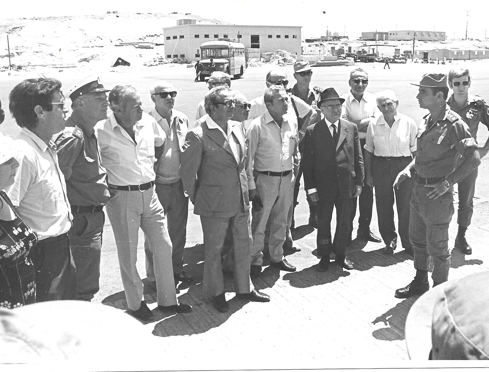 מפקד זירת ים סוף אל"ם גדעון רז ומפקד חיל הים אלוף בנימין תלם מארחים את ועדת החוץ והביטחון של הכנסת